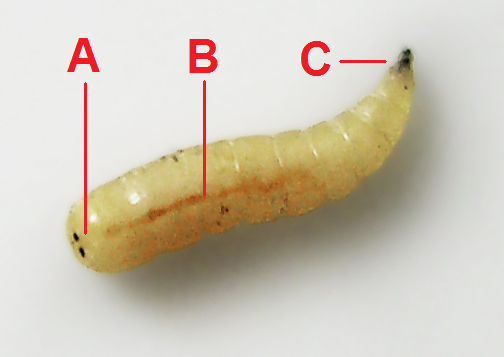 Larve einer Stubenfliege (Musca domestica (larva))